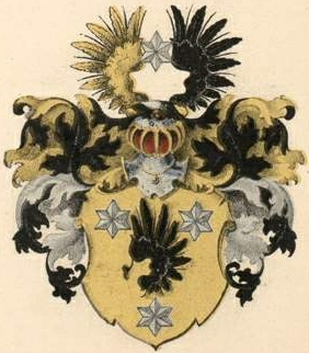 Bergi (Päri) suguvõsa aadlivapp